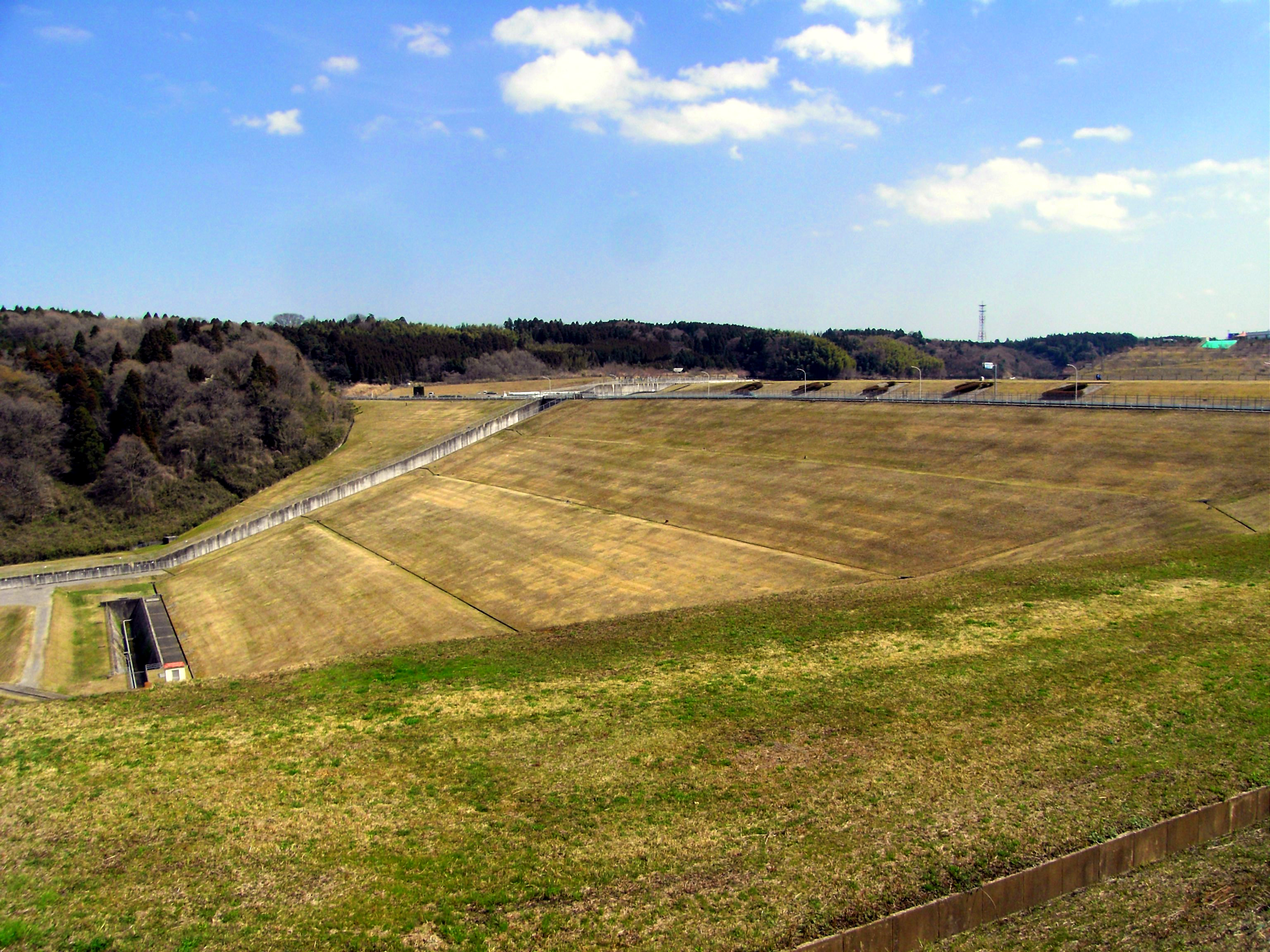 長柄ダム（千葉県・村田川）